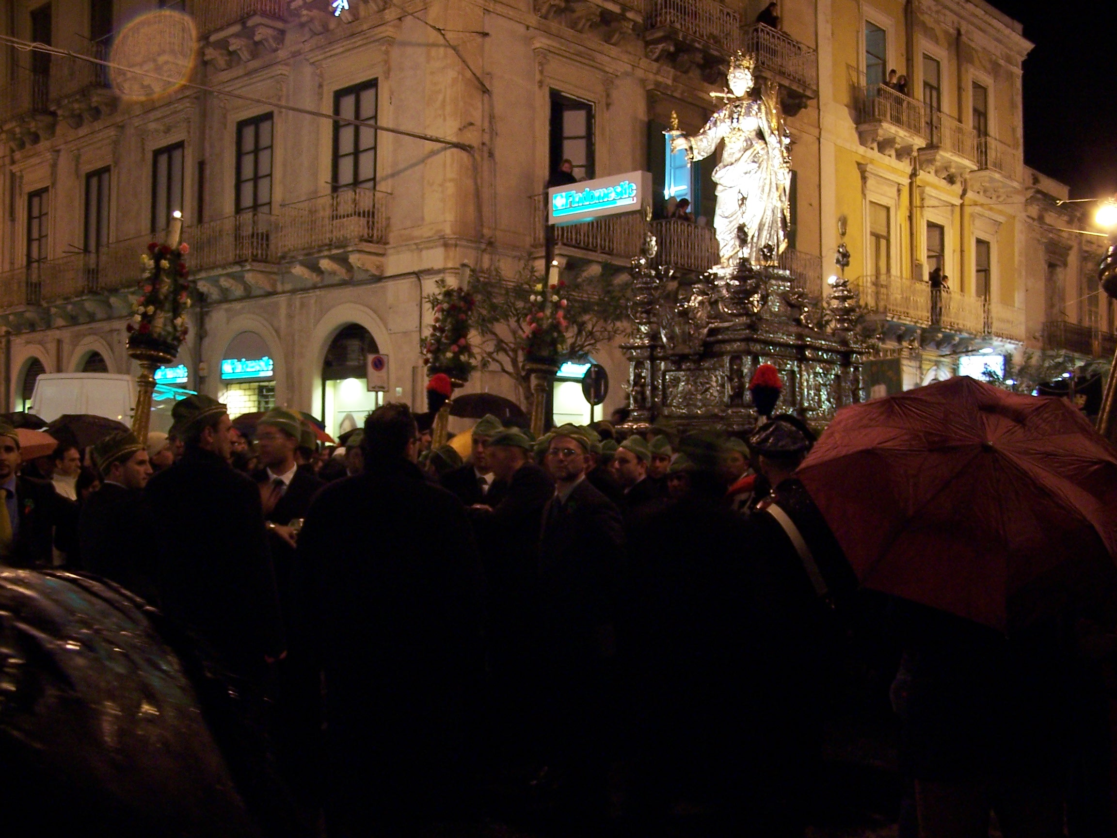 Processione della Festa di santa Lucia a Siracusa.